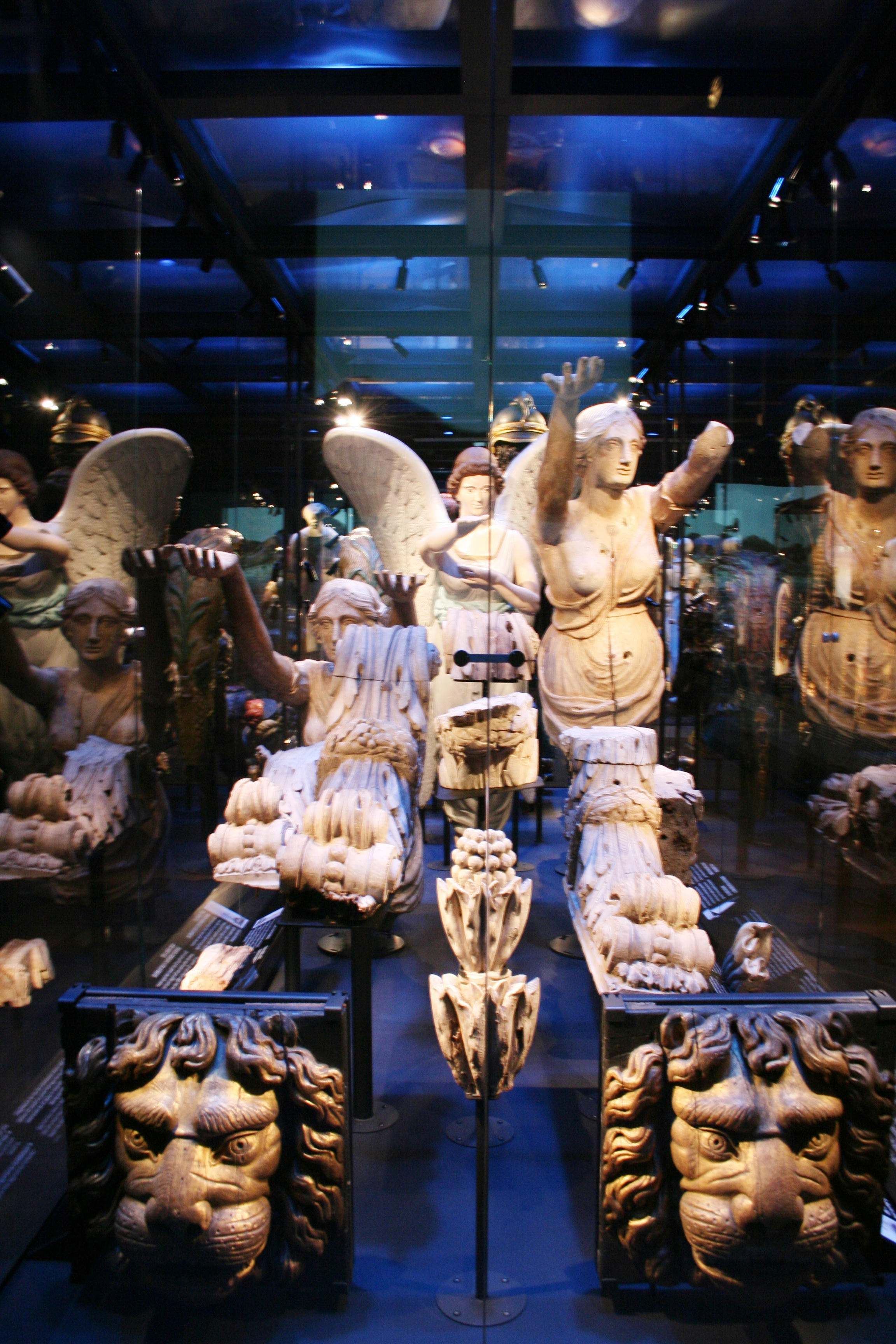 Scheepvaartmuseum, collectie